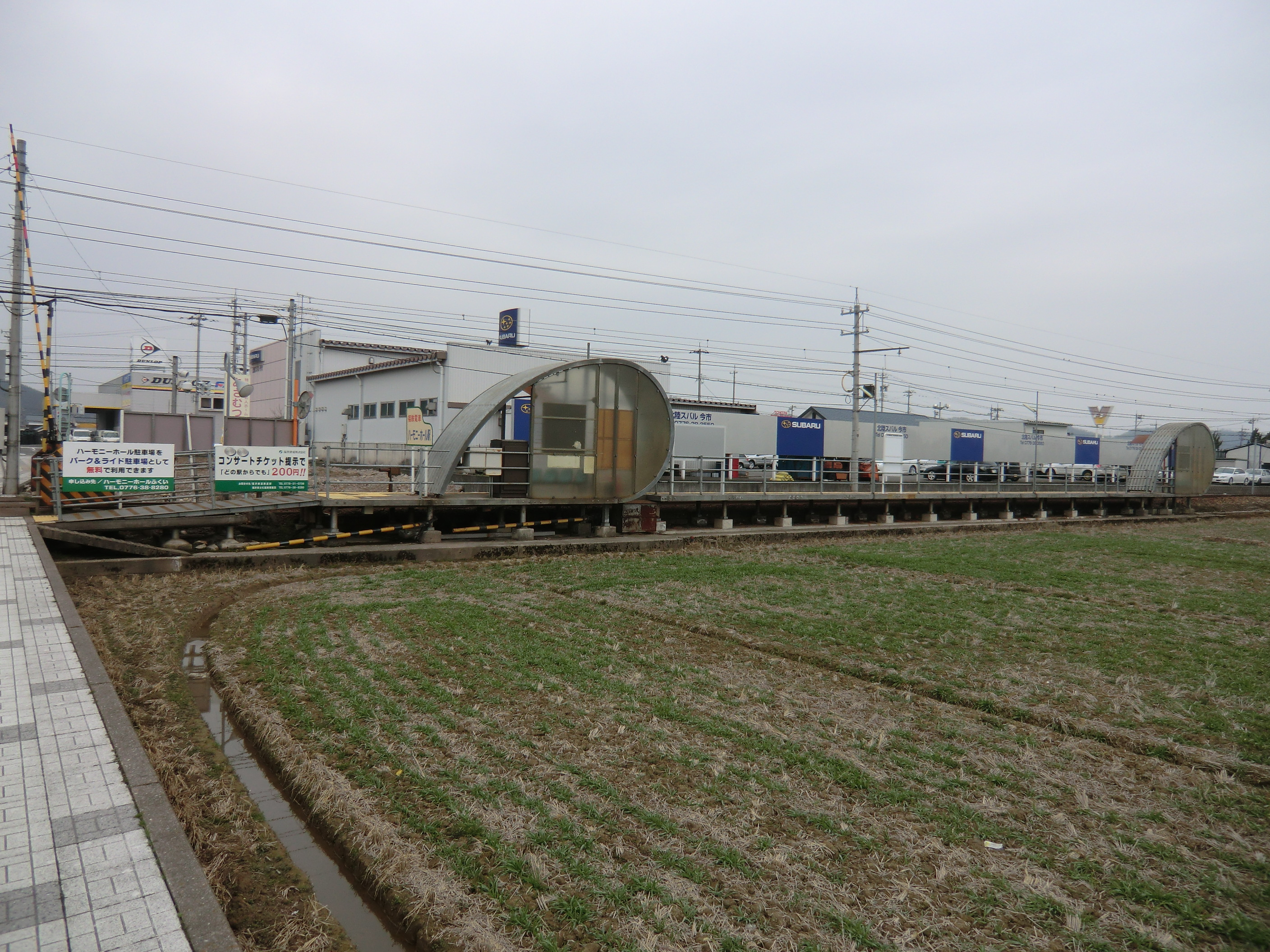 ハーモニーホール駅